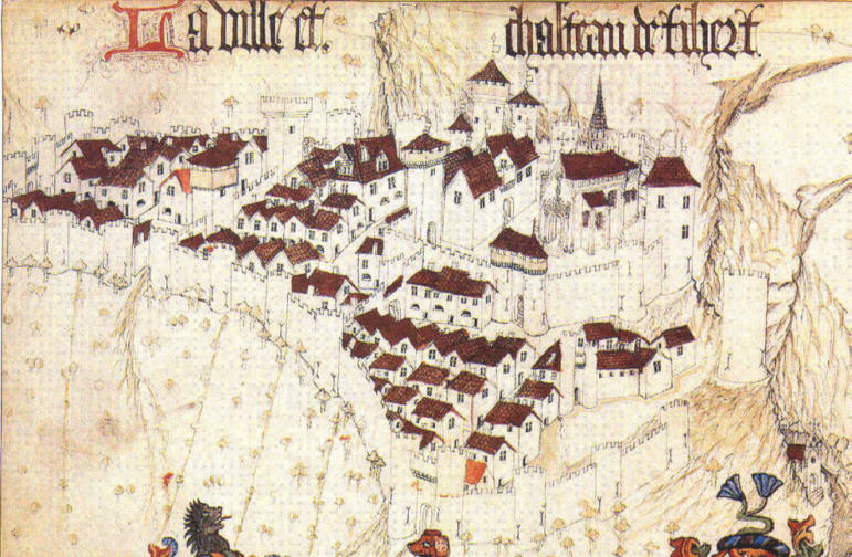 La ville de Thiers vers 1450 Armorial de Guillaume Revel